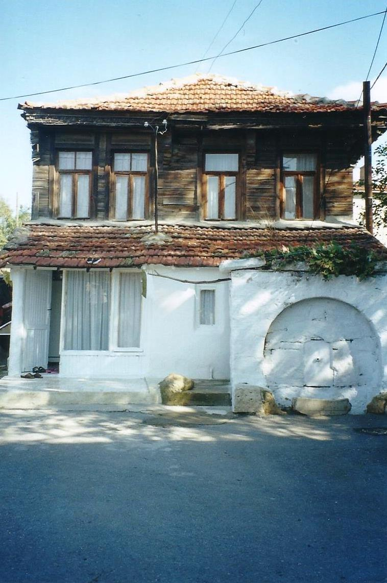 Old greek house in nowadays Celaliye